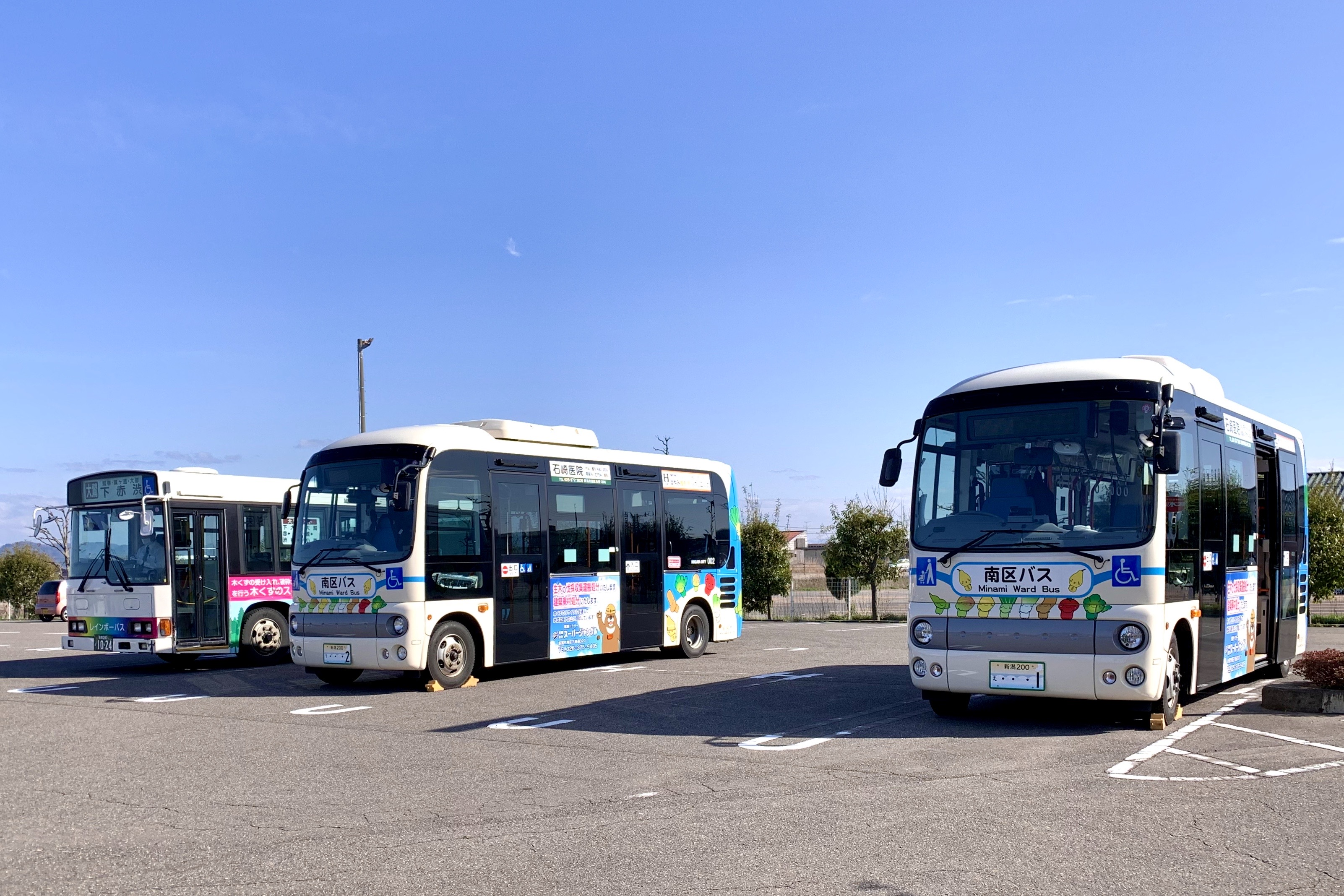 新潟市南区の区バス車両（2020年3月）